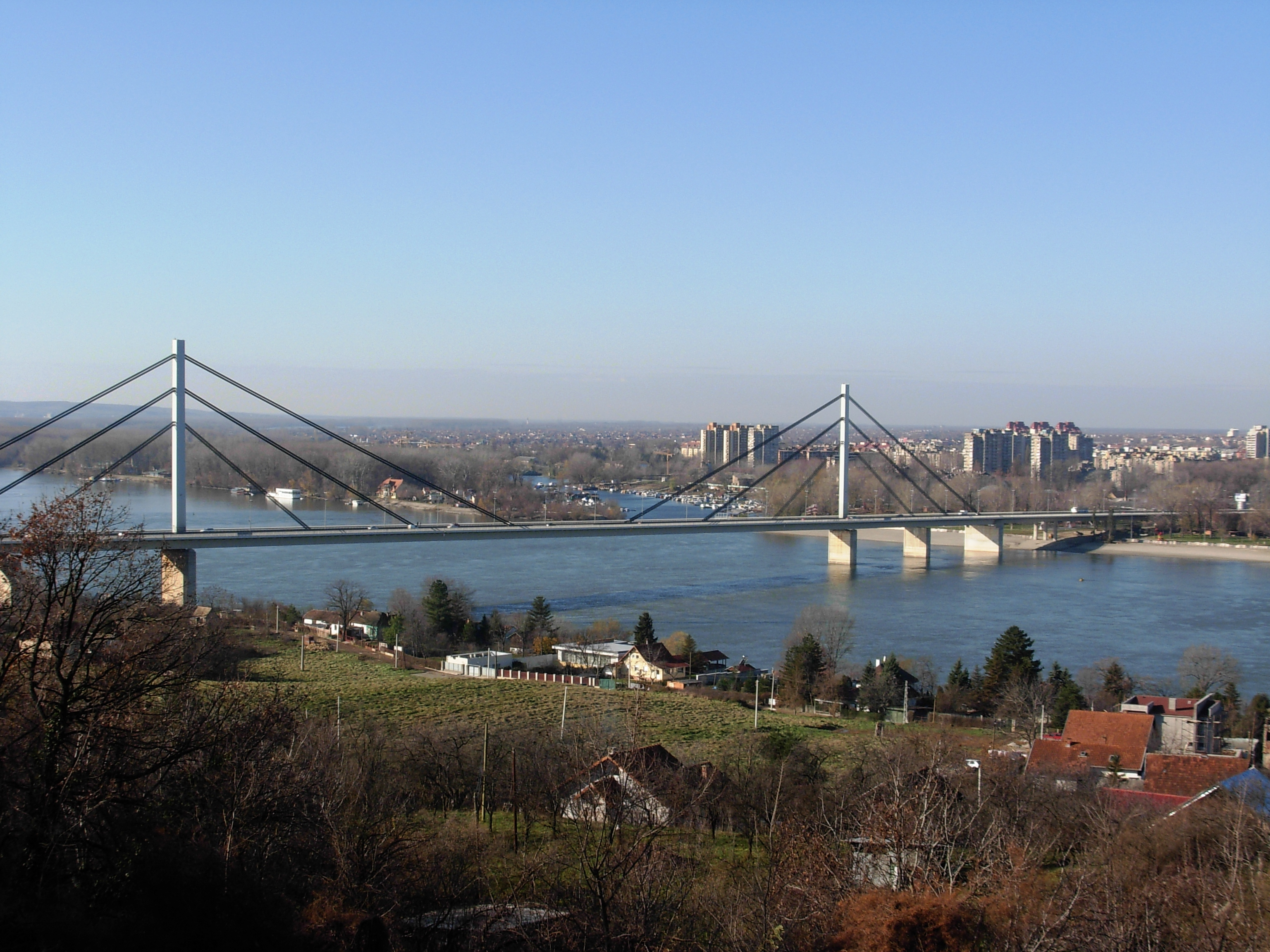 Most Slobode, pogled sa sremske strane (sa Trandžamenta)